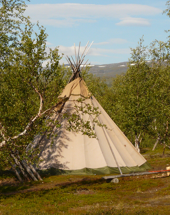 Zeltkote (Lávvu) in Kisuris, Padjelanta-Nationalpark, Schweden